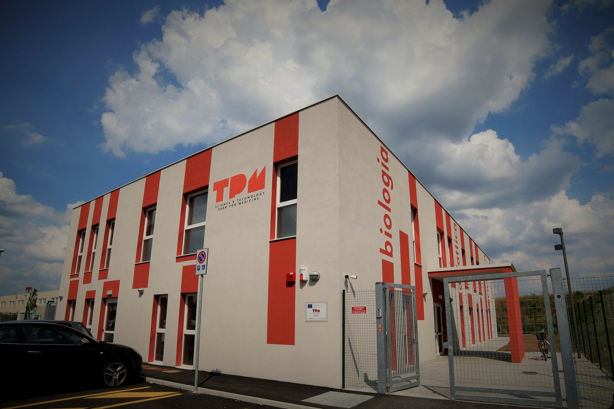 Il TPM - Technology Park for Medicine di Mirandola è un progetto realizzato dalla Fondazione Democenter, cofinanziato dalla Regione Emilia-Romagna con i fondi europei a seguito del sisma del 2012. I lavori di costruzione, iniziati nel 2013, si sono conclusi nel 2014; il TPM è stato inaugurato il 10 gennaio 2015.